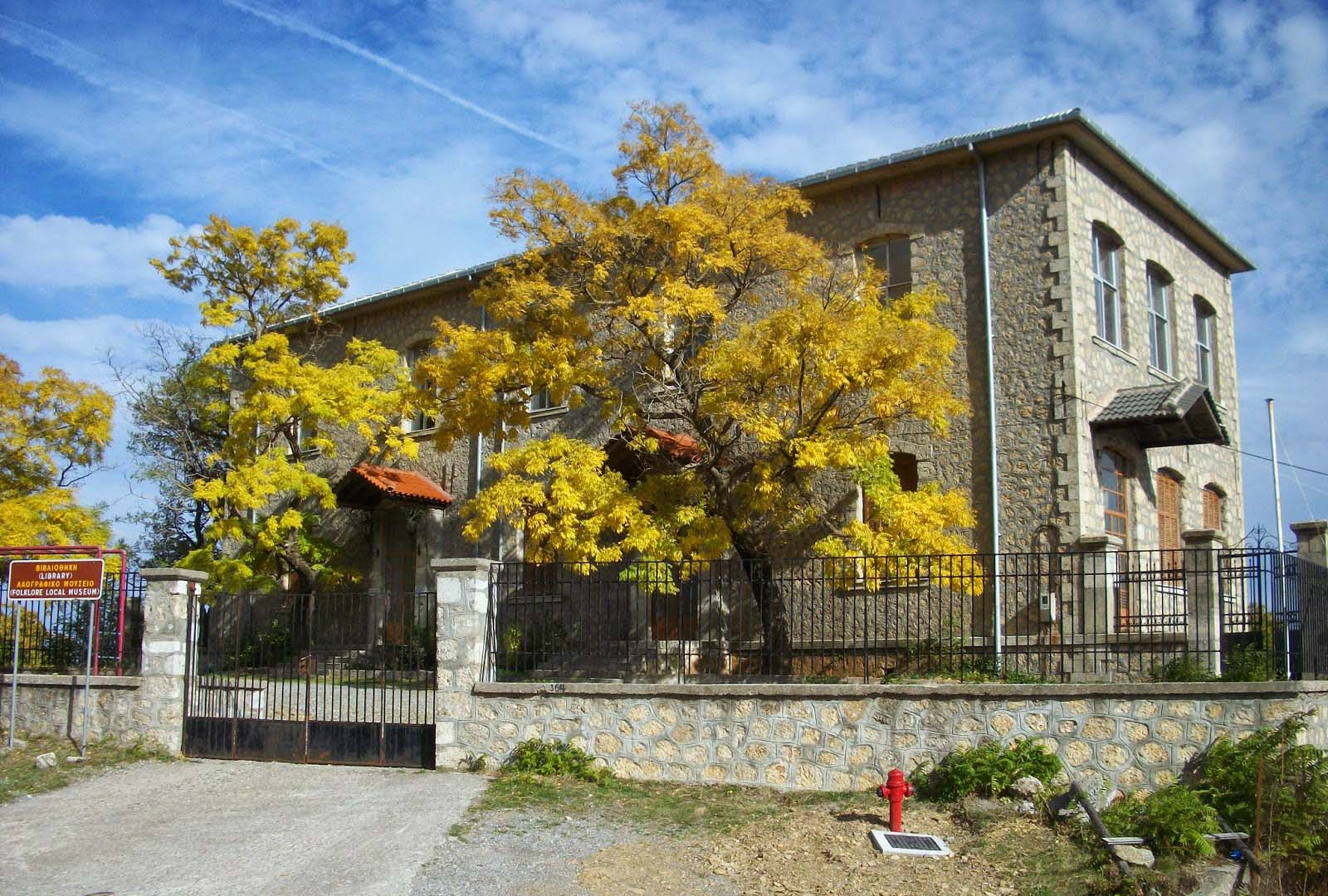 Το σχολείο του χωριού - Ο χώρος στον οποίο στεγάζεται το λαογραφικό μουσείο και η βιβλιοθήκη.